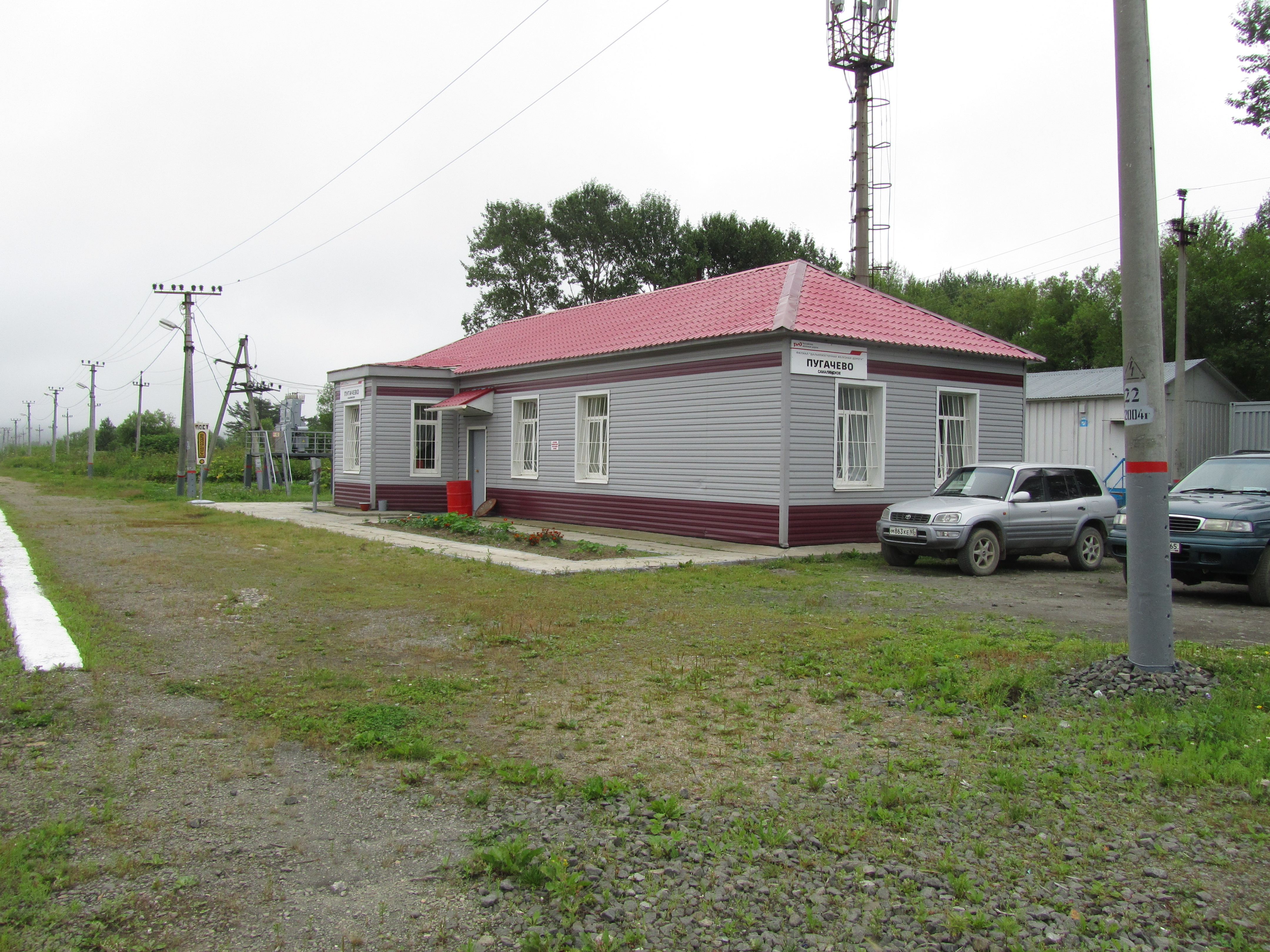 Станция Пугачево Сахалинского региона ДВЖД